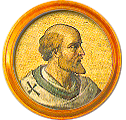 Médaillon de la frise des papes à Saint-Paul-hors-les-Murs. Il s'agit d'une mosaïque représentant Sylvestre II, 139e pape de l'Église catholique (999-1003). Il fait parie de la série de médaillons voulue par Grégoire XVI destinée à remplacer ceux de l'ancienne basilique après l'incendie de 1823.